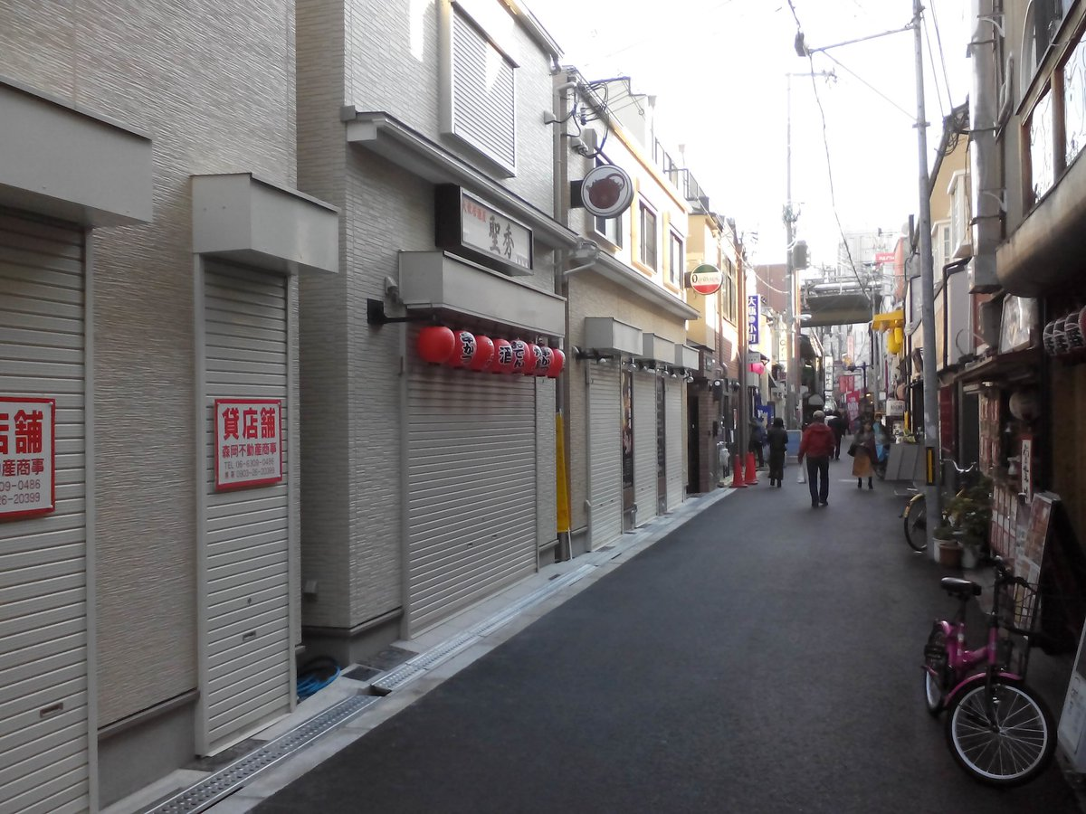 阪急十三駅周辺における火災現場の辺り。2016年11月の復興してきた姿。